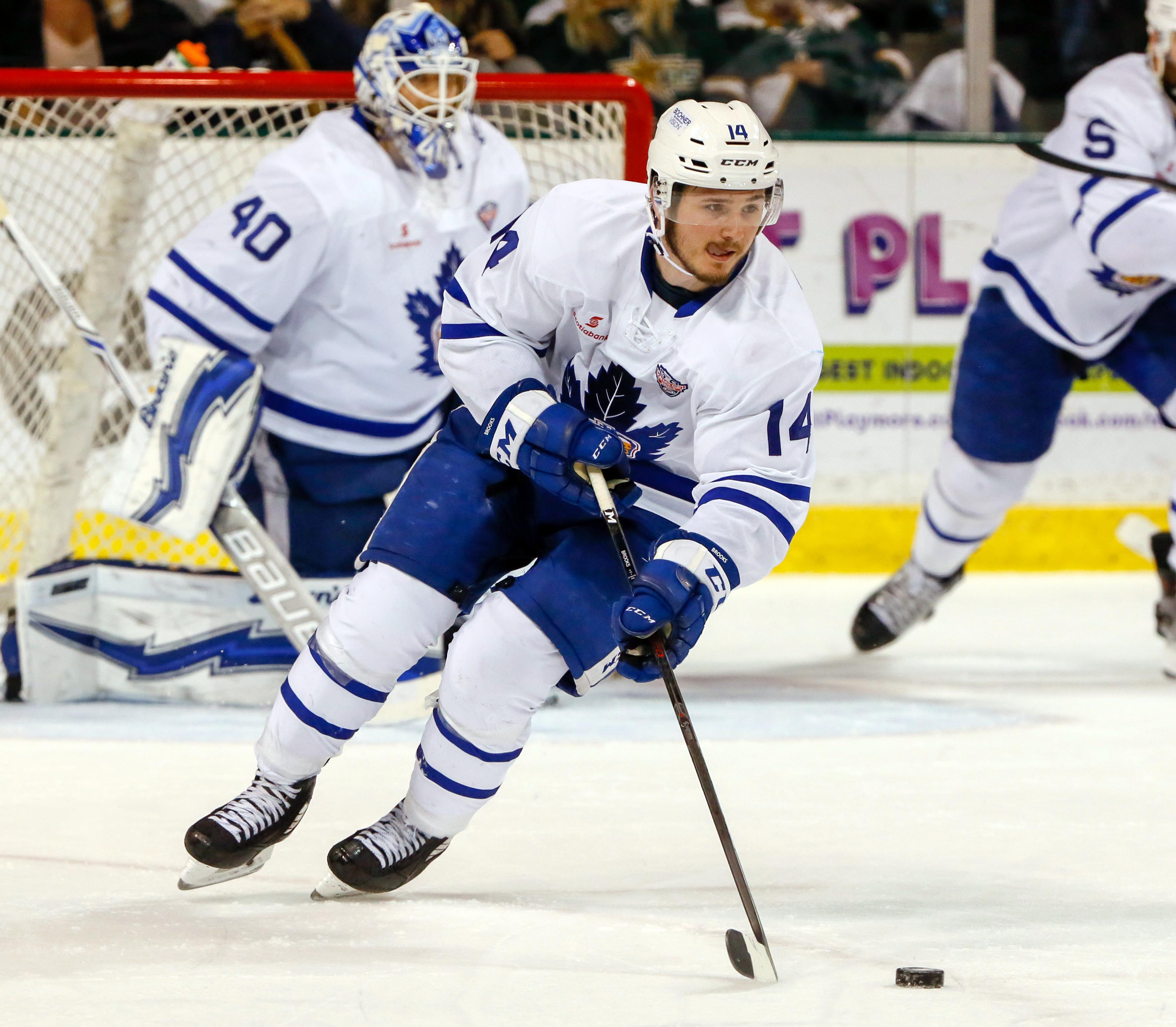 Photo: Andy Nietupski